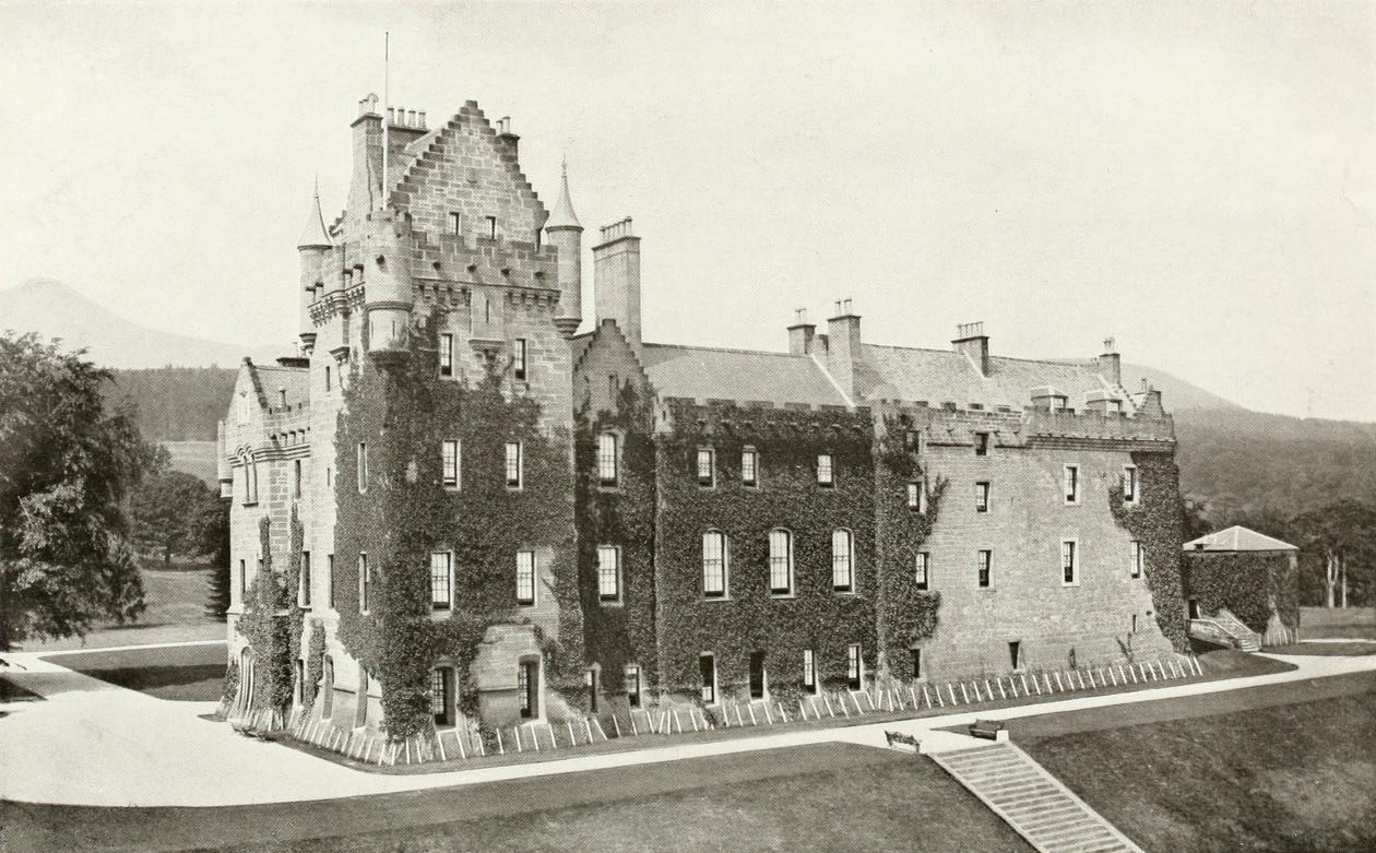 Brodick Castle, Ansicht von Süden